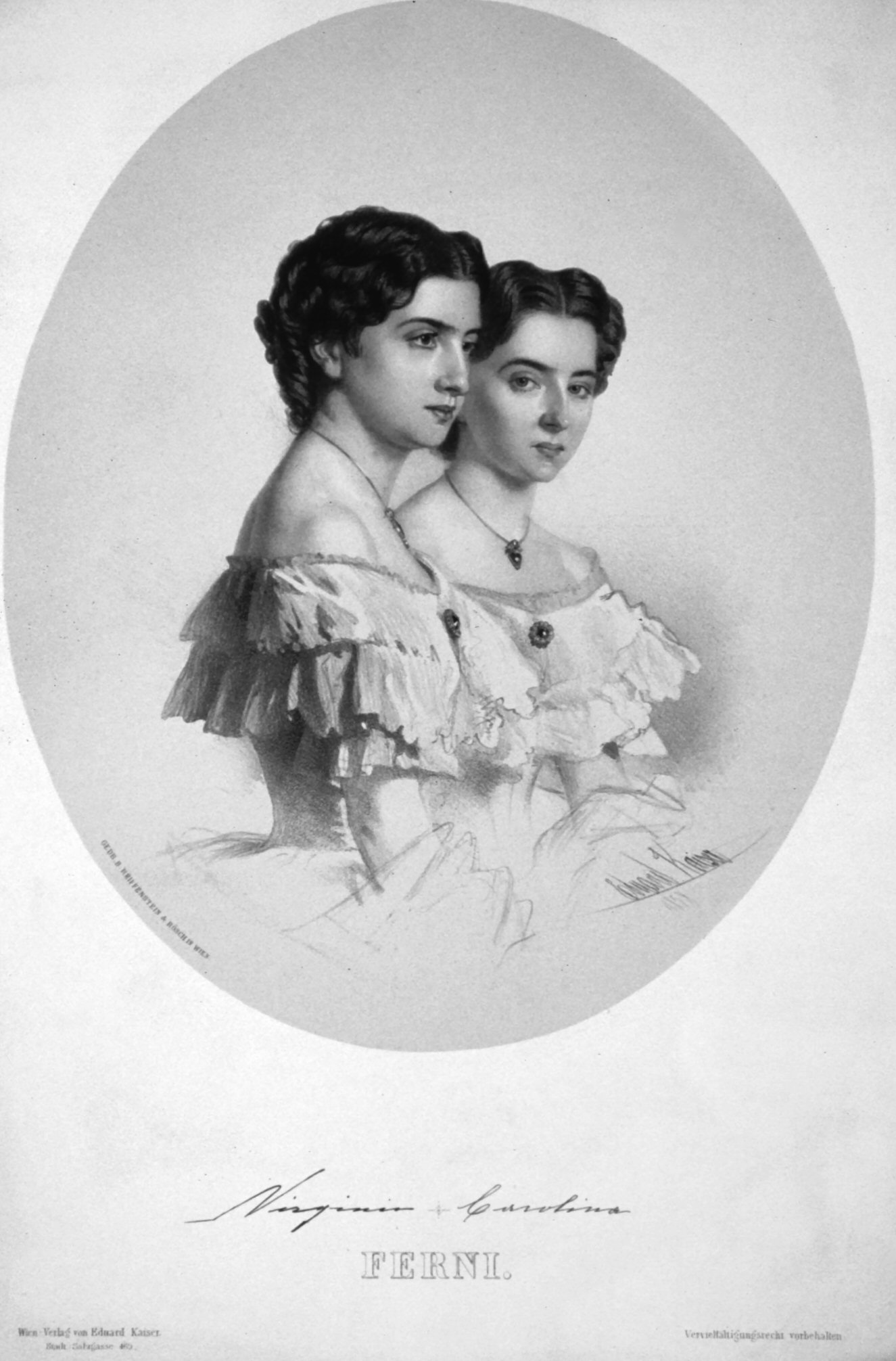 Carolina (1839-1926) und Virginia(1837-1926) Ferni. Geigenvirtuosinnen. Lithographie von Eduard Kaiser, 1858